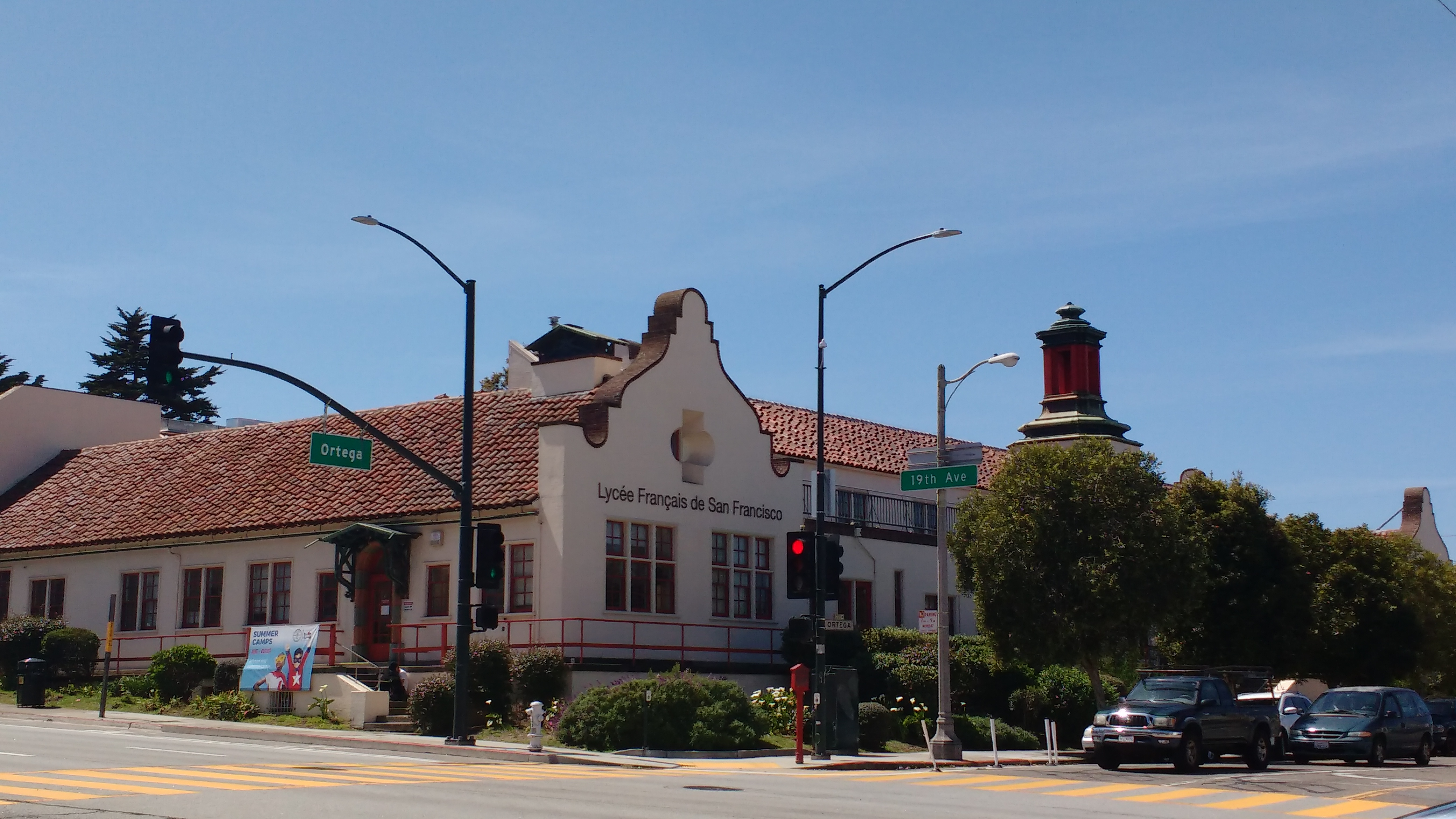 Ortega Campus (6ème à la Terminale)